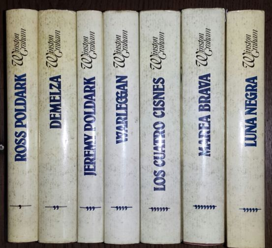 Los lomos de los siete primeros libros de la saga de Poldark, por Winston Graham, donde se ve sus títulos en español.